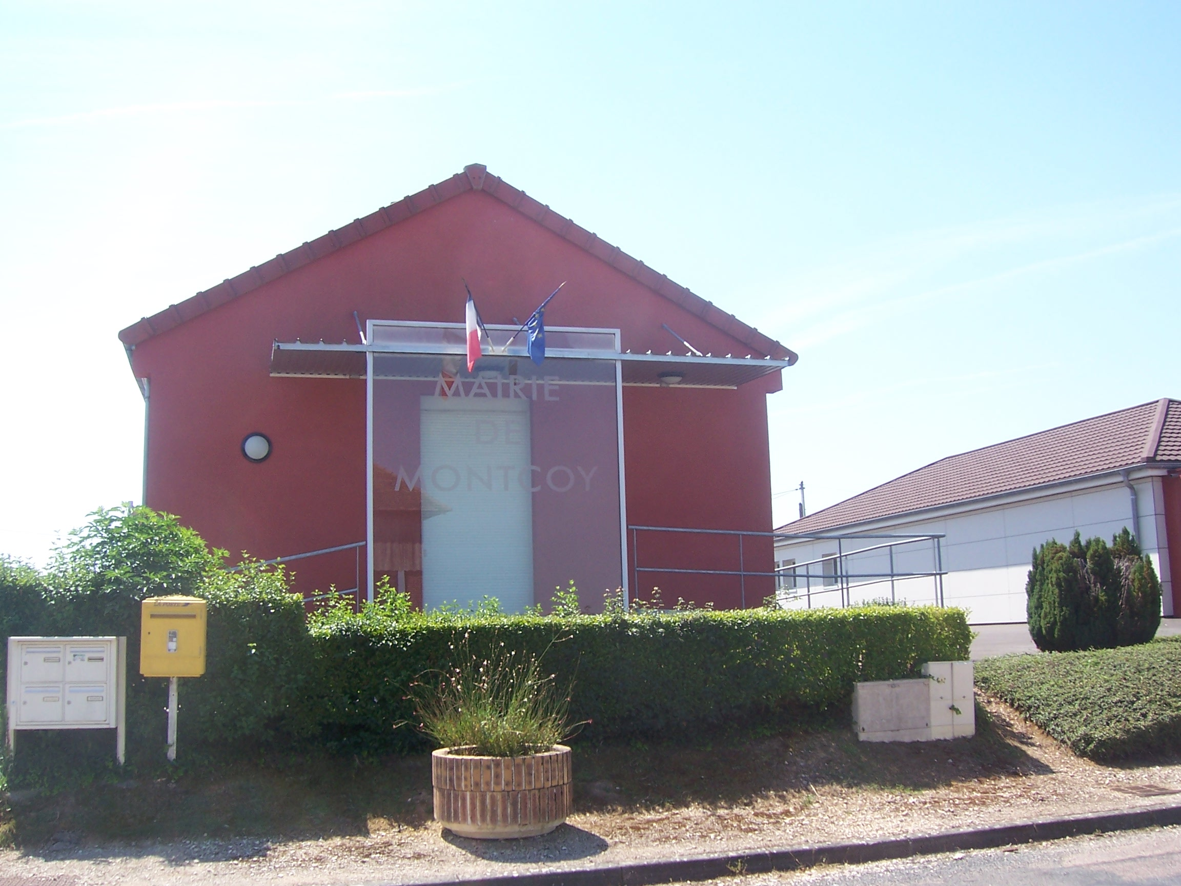 Mairie de Montcoy